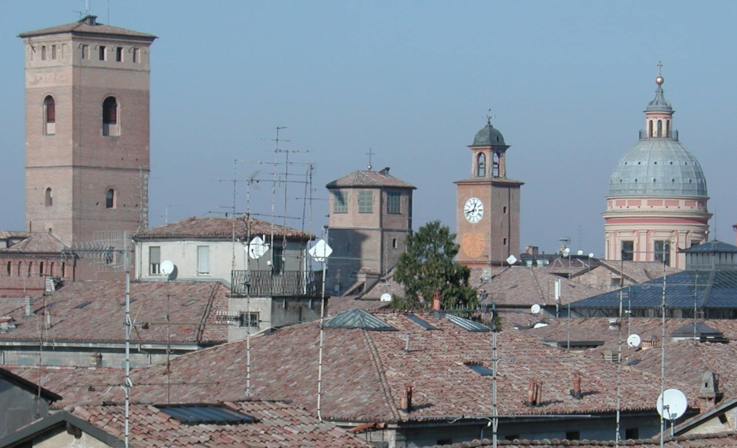 Reggio Emilia Italy panorama profilo della città panorama and skyline author:Paolo da Reggio